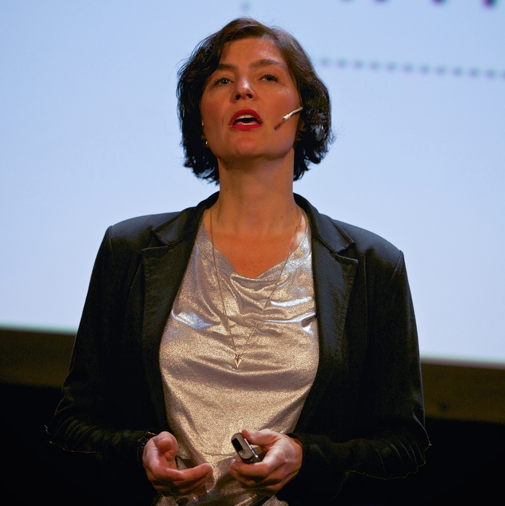 Ungdommens P U. Redaktørpanel og ungdomspanel.Moderator: Kjersti Løken Stavrum.